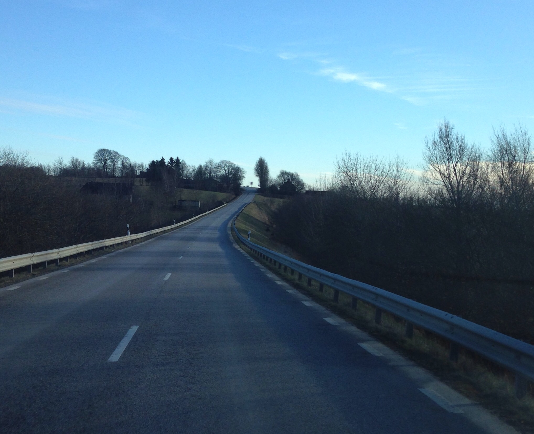 Länsväg 102 vid Stenberget, mellan Veberöd och Skurup.